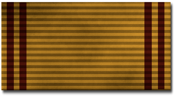 Liettuan Gediminasin ritarikunnan kunniamerkkinauha.